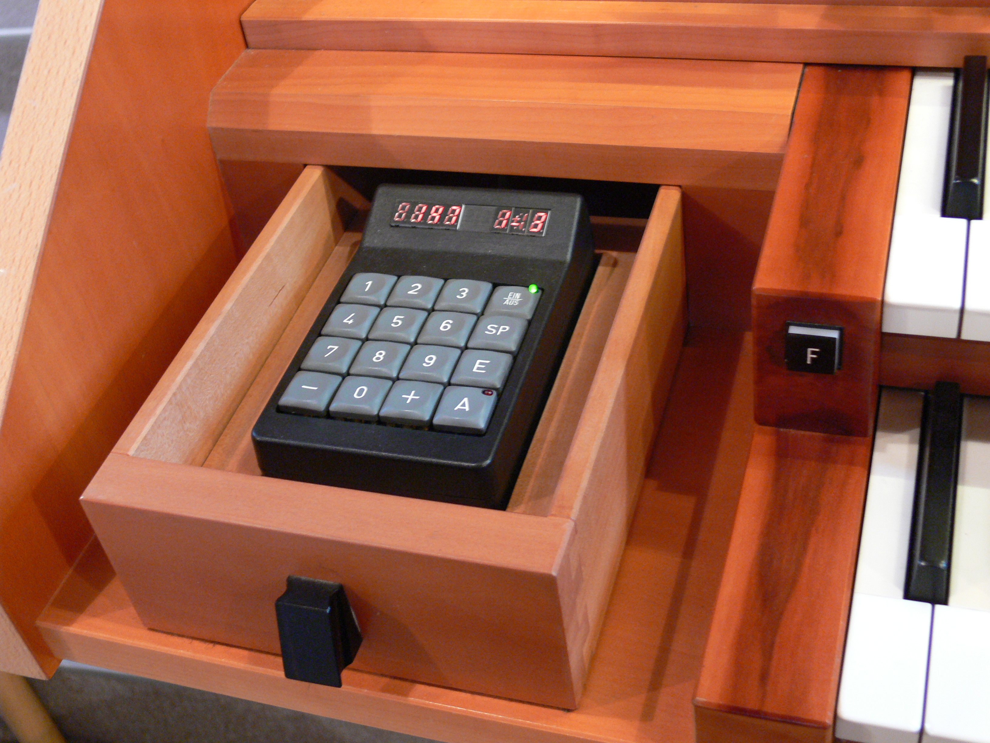 Gemeindezentrum und Kirche Heilig Kreuz, Ravensburg Orgel, Bedienfeld des elektronischen Liedanzeigers in einer Schublades des Spieltisches